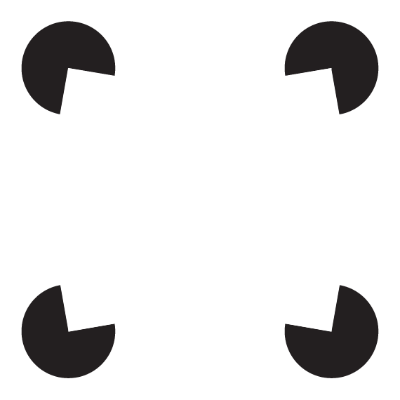 Carré de Kanizsa bombé, type de stimulus utilisé dans l'étude "Deriving behavioural receptive fields for visually completed contours" (Gold et alii, Current Biology, 2004)